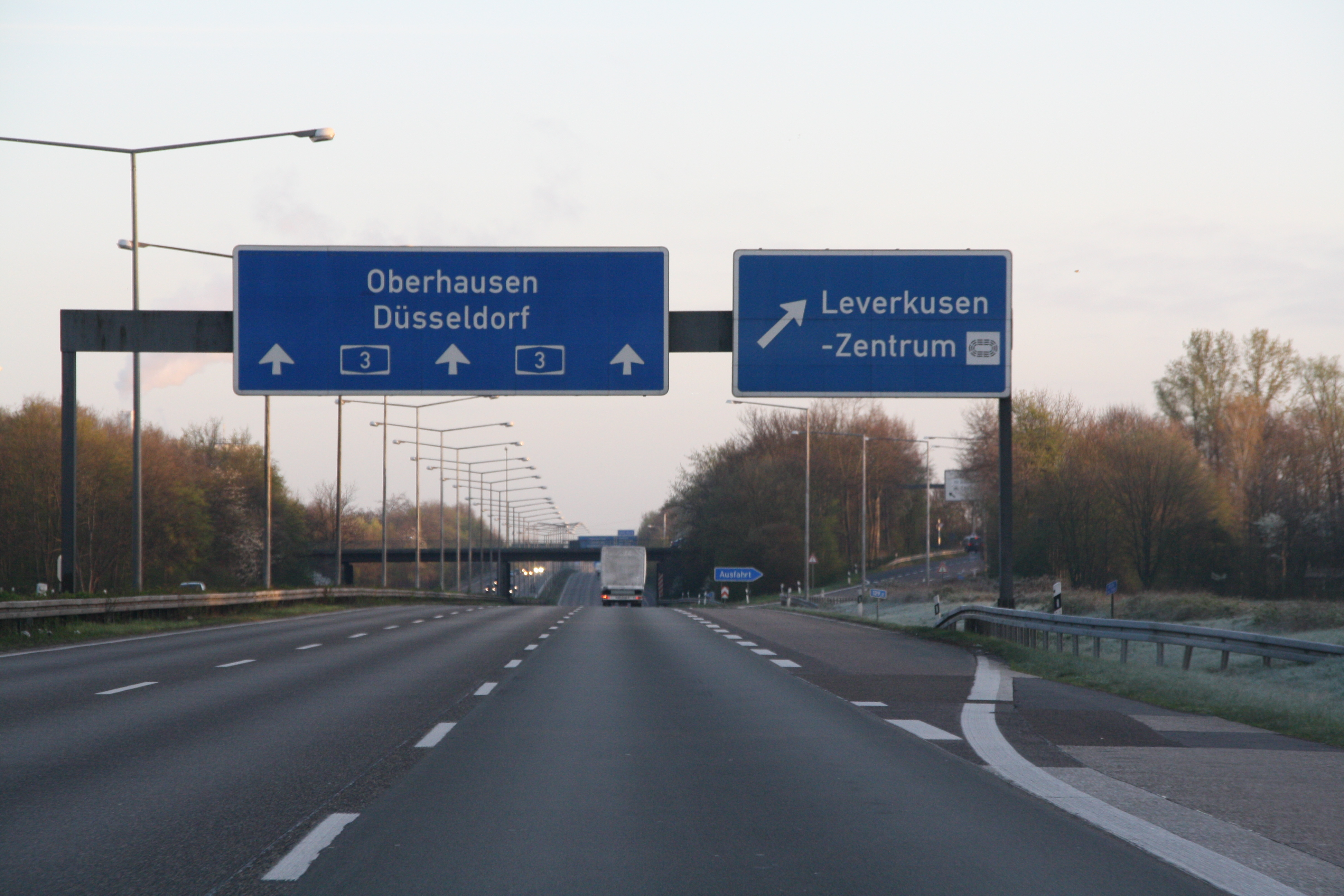 ohne Stau by Niederkasseler